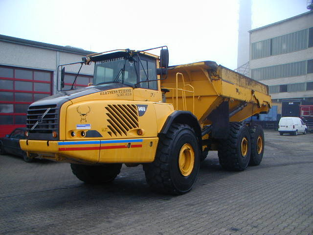 Volvo A40D, Motor Volvo D12C ACE2, Nennleistung 309 kW (420 PS) bei 1800 U/min, Max. Drehmoment 2056 Nm bei 1200 U/min, Höchstgeschwindigkeit 55 km/h, Ladekapazität gestrichen 16,9 m³, gehäuft 22,5 m³, Nutzlast 37 t, Nettogewicht 31,3 t